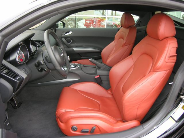 Audi R8